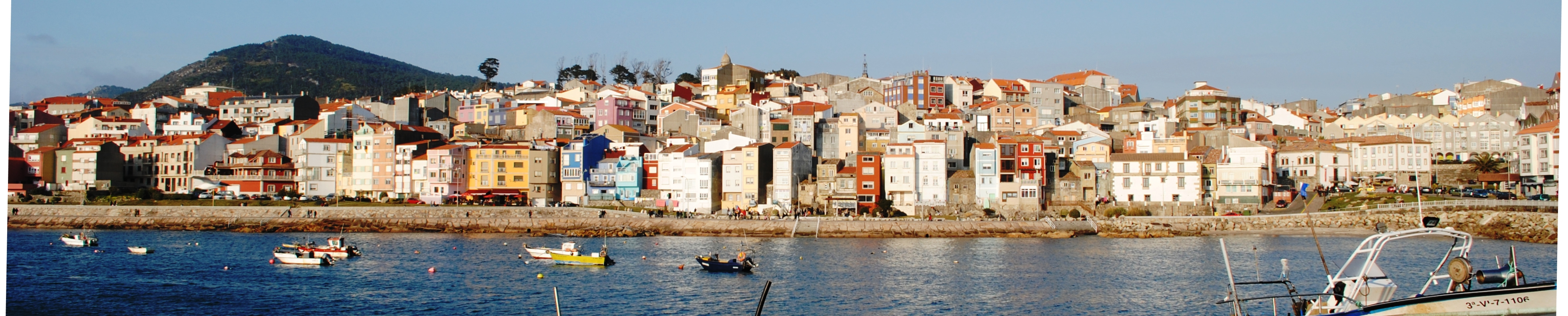 A Guarda, panorámica